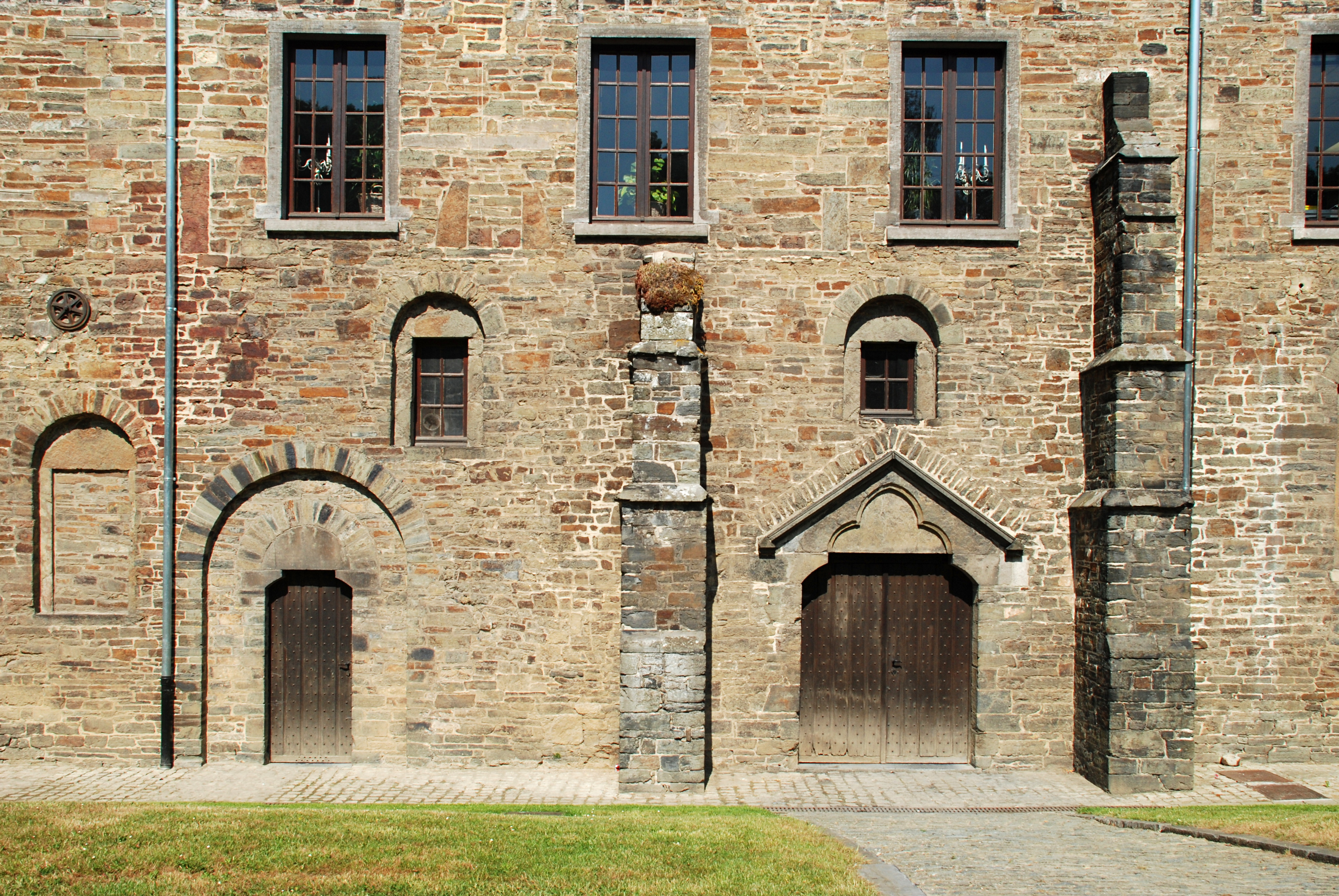 Belgique- Brabant wallon - Villers-la-Ville - ancien moulin abbatial